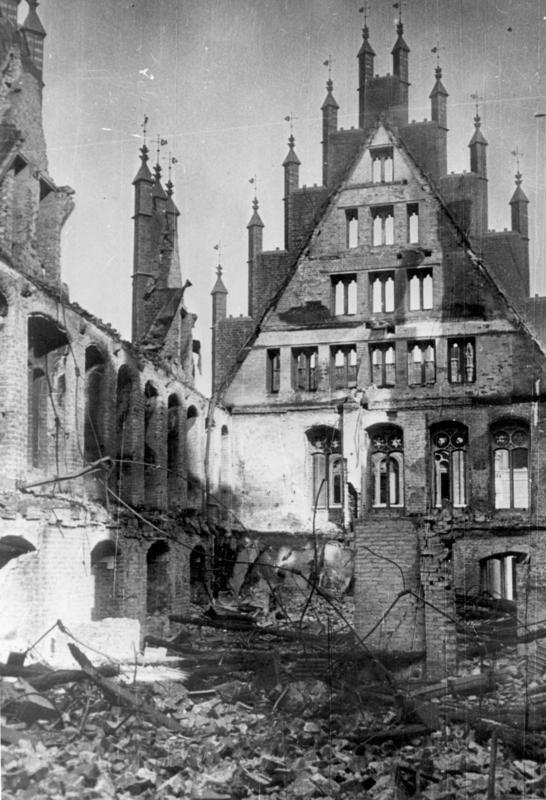 Hannover Altes Rathaus-Festsaal